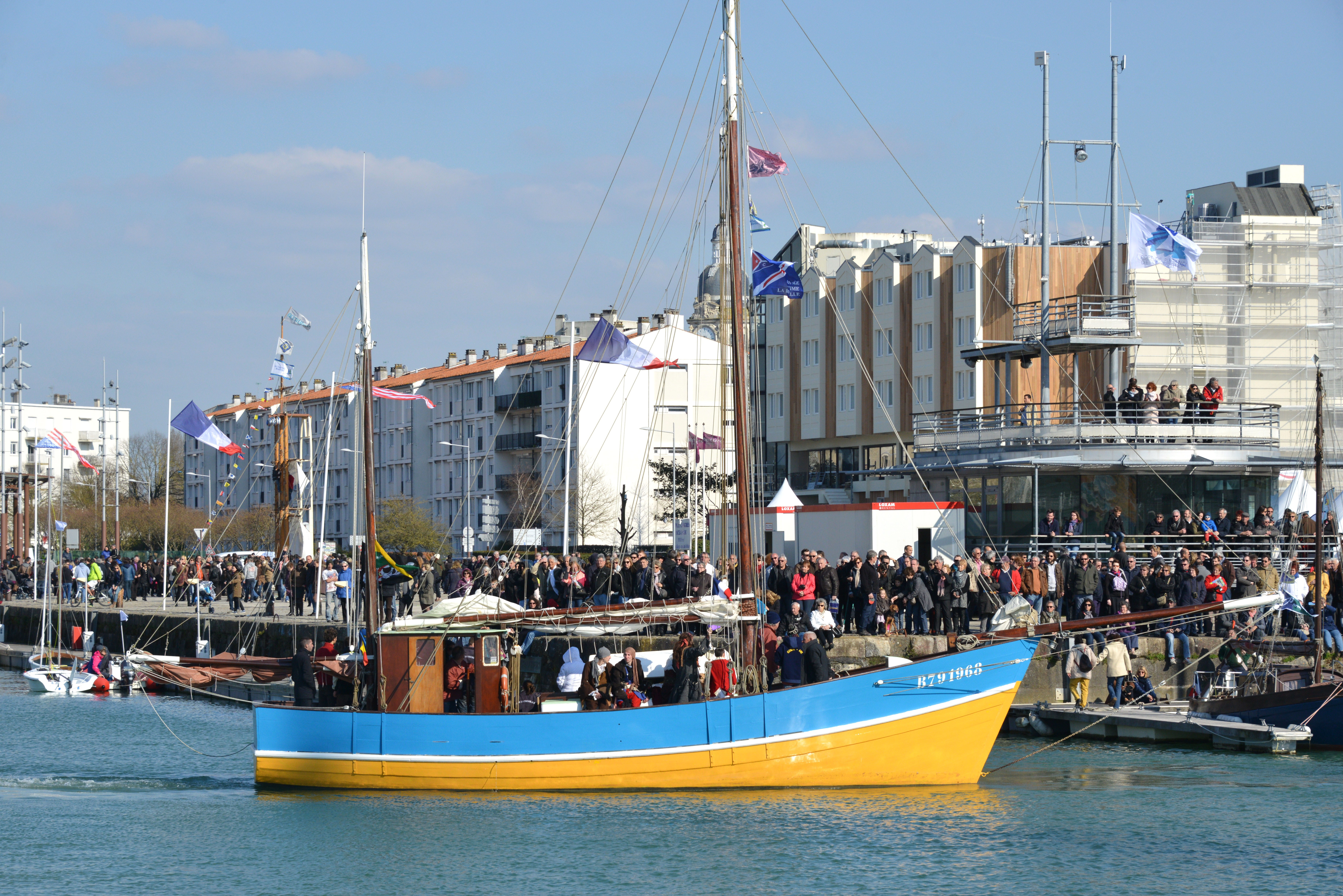 Le ketch de pêche « Guide Me » dans le Bassin des Chalutiers après la parade nautique organisée pour la fête de la frégate « L’Hermione » à La Rochelle en avril 2015. La Rochelle, Charente-Maritime, France.